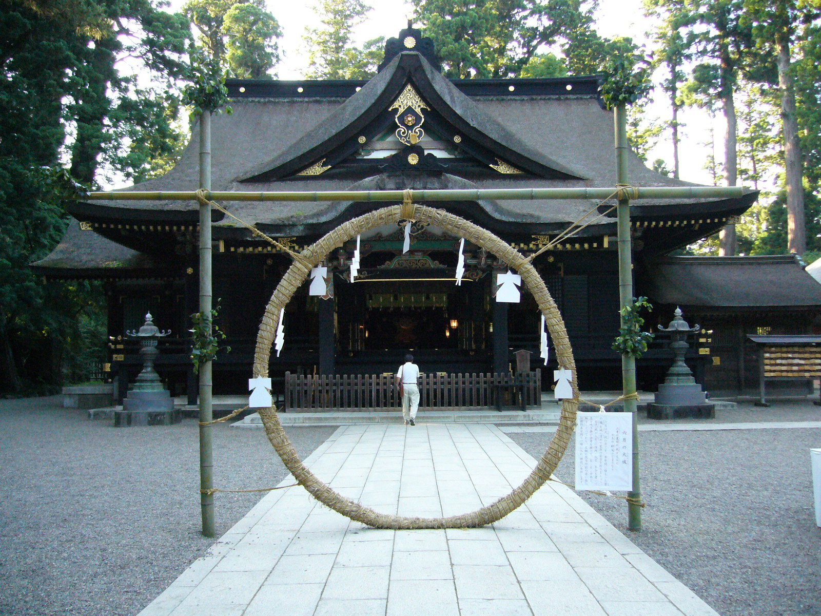 ooharae-chinowa-summer,katori-jingu,katori-city,japan